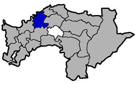 KaurJmeb為編輯臺灣省嘉義縣新港鄉，於2005年2月10日所繪。